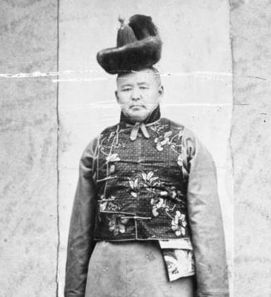 Монгол: Гомбожавын Лувсанцэвээн (1869-1922)